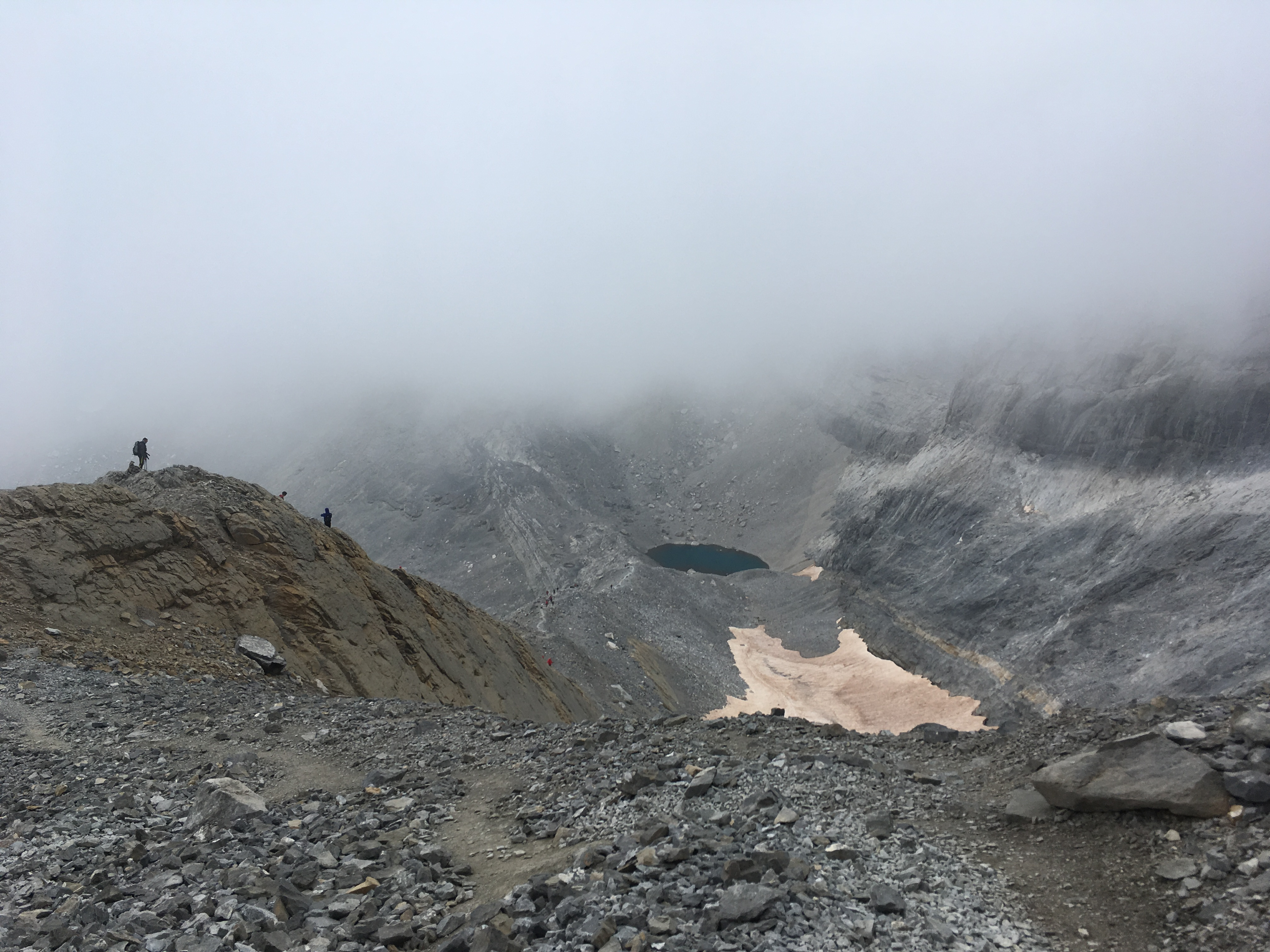 Ibón Chelau de Monte Perdido